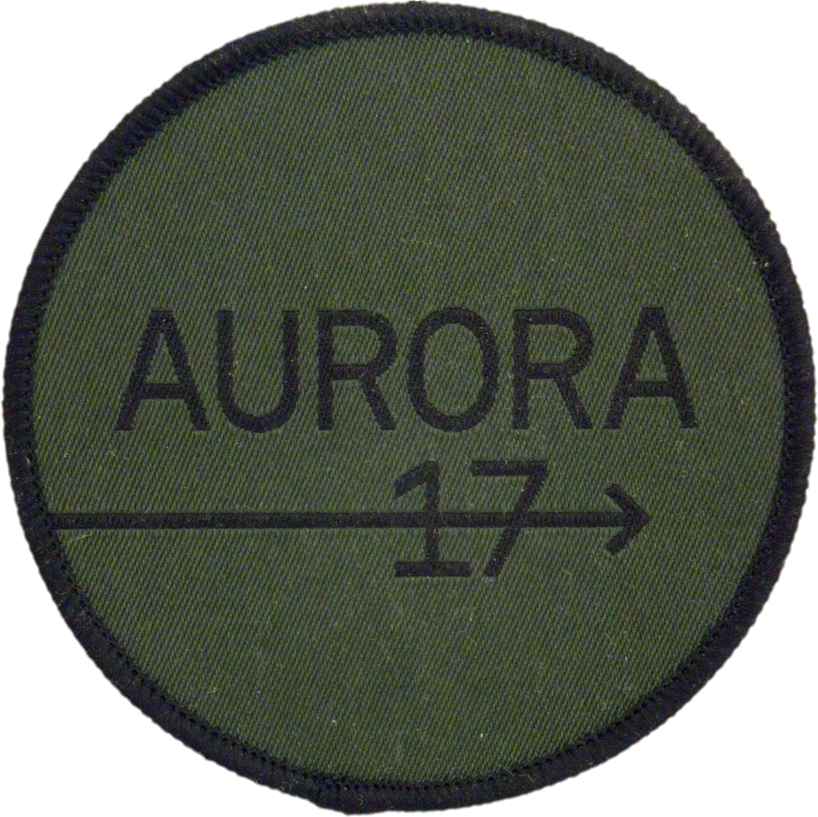 Tilläggsmärke i textil (till stridsuniformssystemet) som bars av personal som deltog i Försvarsmaktsövning Aurora 17